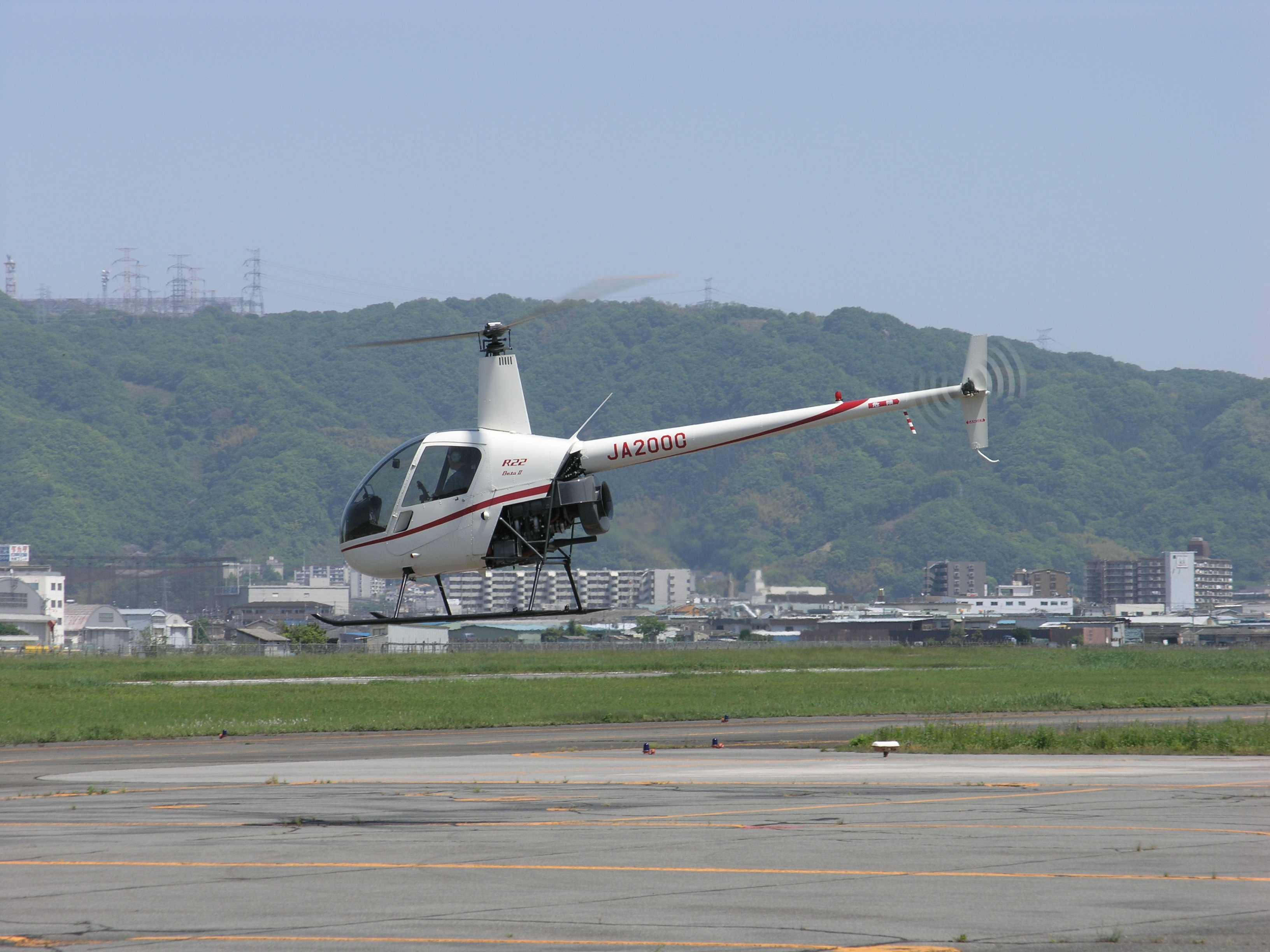 Robinson R22 BetaII at Yao Airport, Osaka, Japan